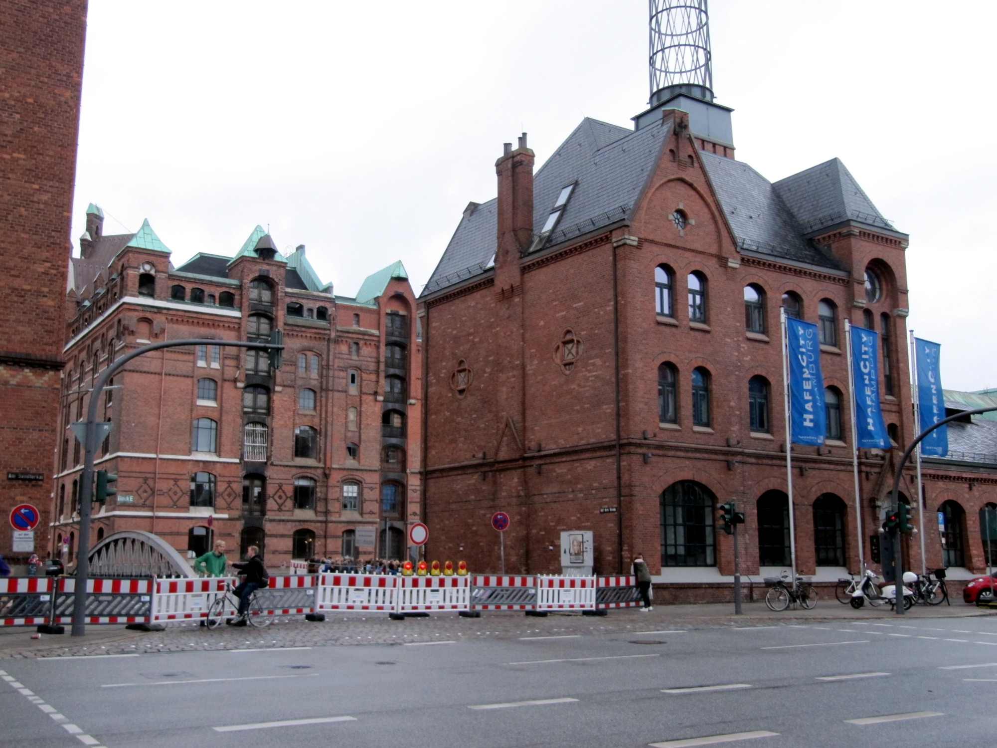 Kesselhaus Speicherstadt (Infocenter HafenCity bzw. Theater in der Speicherstadt)